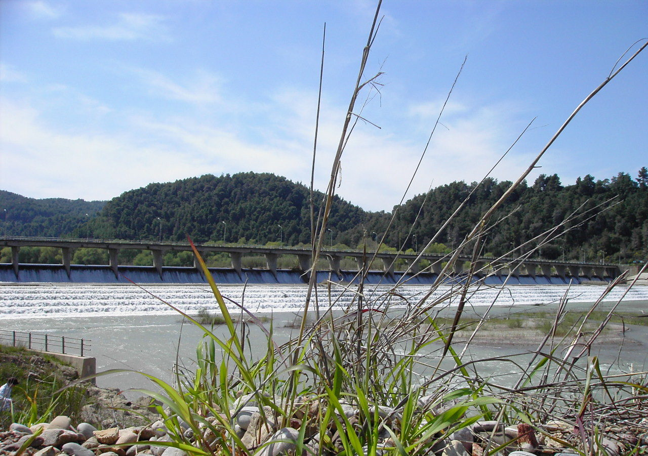 Foto Sofie Debognies april 2005. Stuwdam op de Alpheüs, in de buurt van Olympía